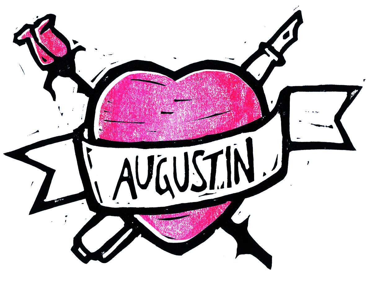 Augustin Liebhaber_innen Logo